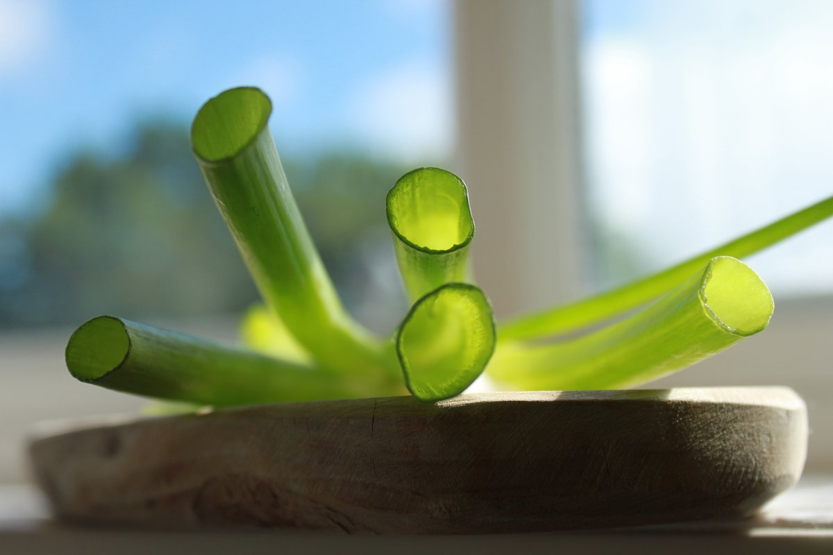 green onions